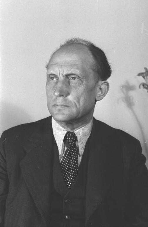 ADN-ZB/Quaschinsky 9.4.1951 Dr. Karl Steinhoff, Minister des Innern der Deutschen Demokratischen Republik.